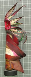 Farbige Kleinplastik überwiegend aus Karton